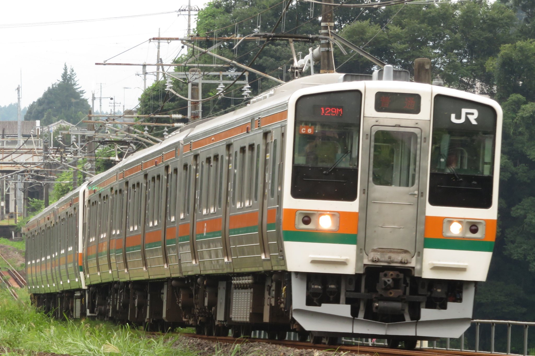 211系3000番台タカC6 信越線磯部-松井田